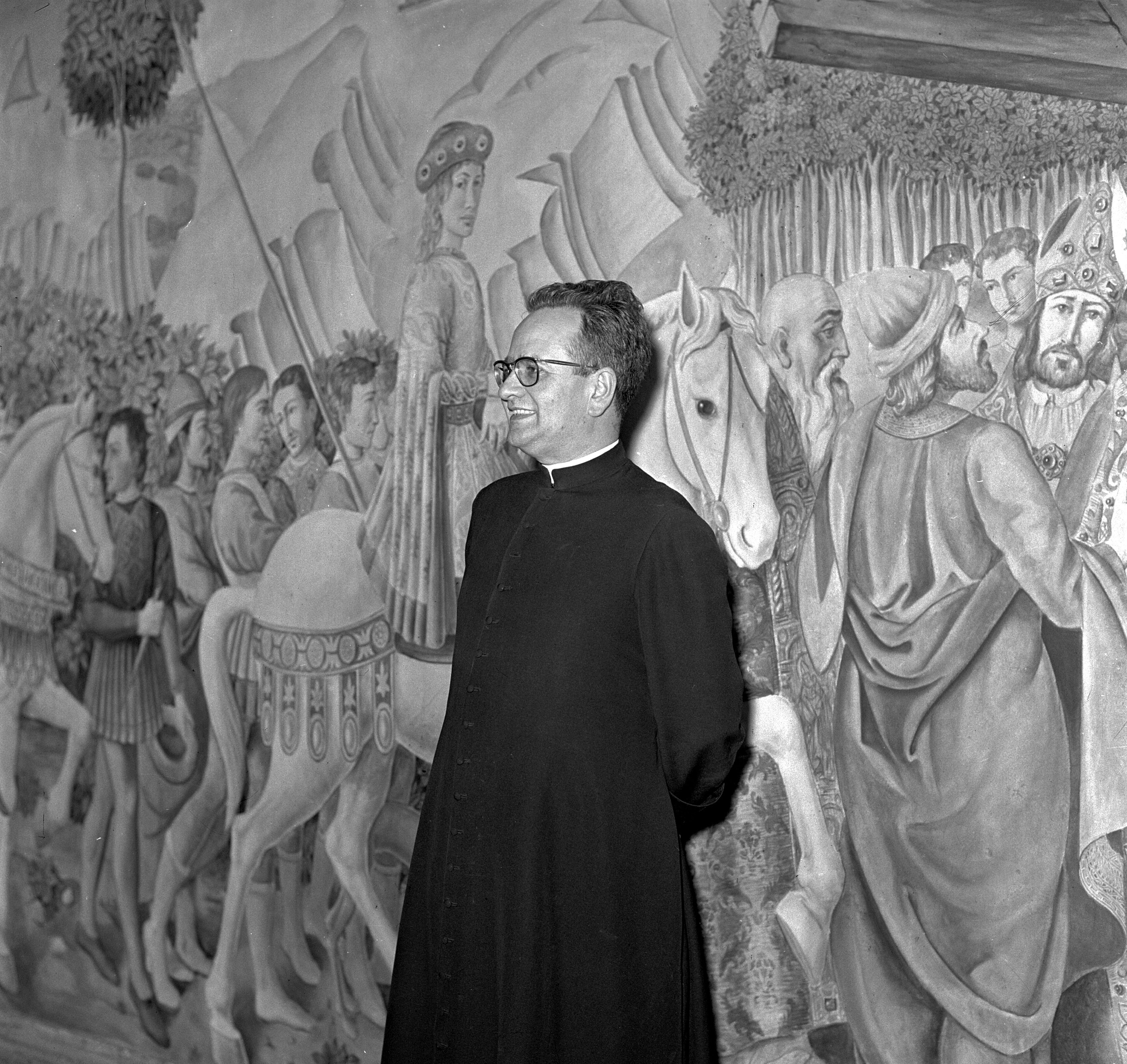 José María Hernández Garnica en Roma, 10 de junio de 1956